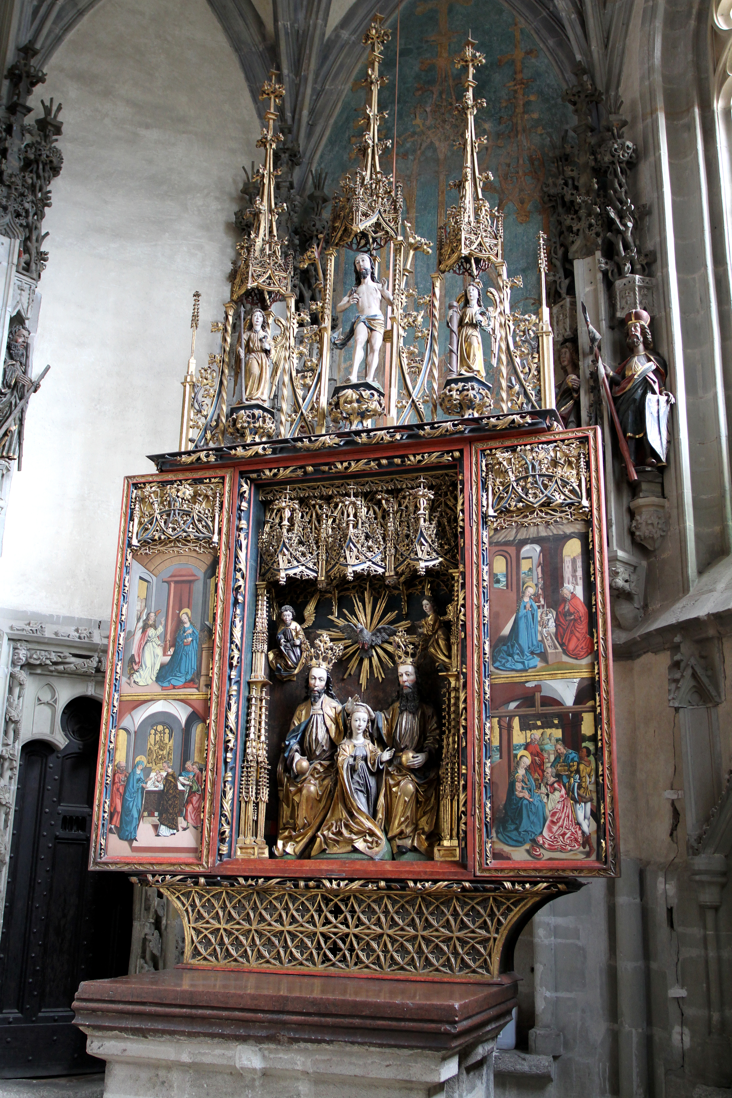 Hrad Křivoklát (Křivoklát), Křivoklát 47